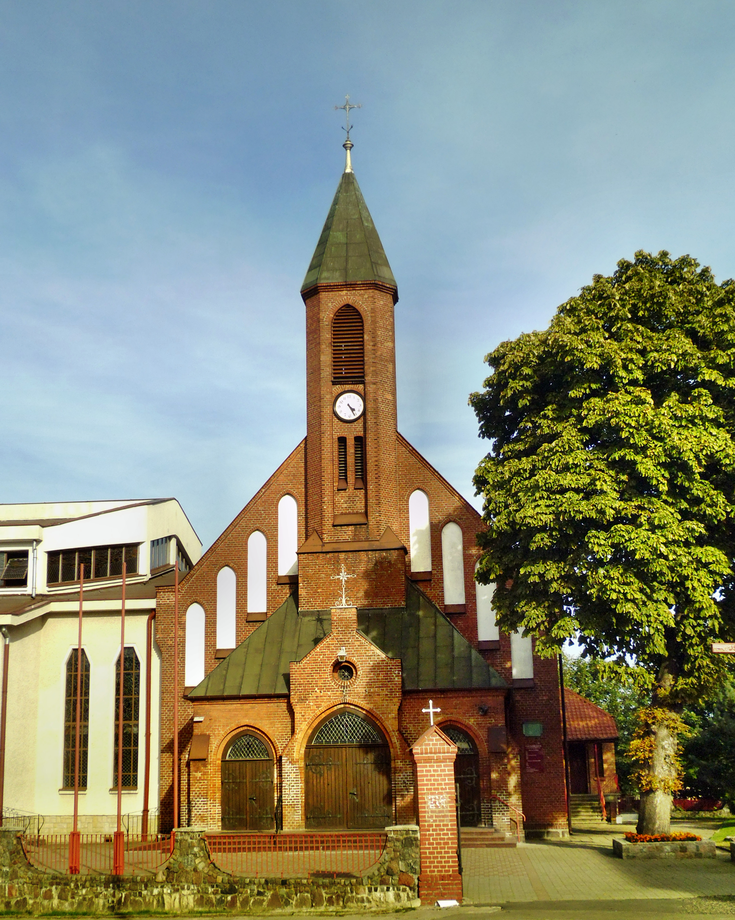 Gdynia - kościół pw. Św. Mikołaja